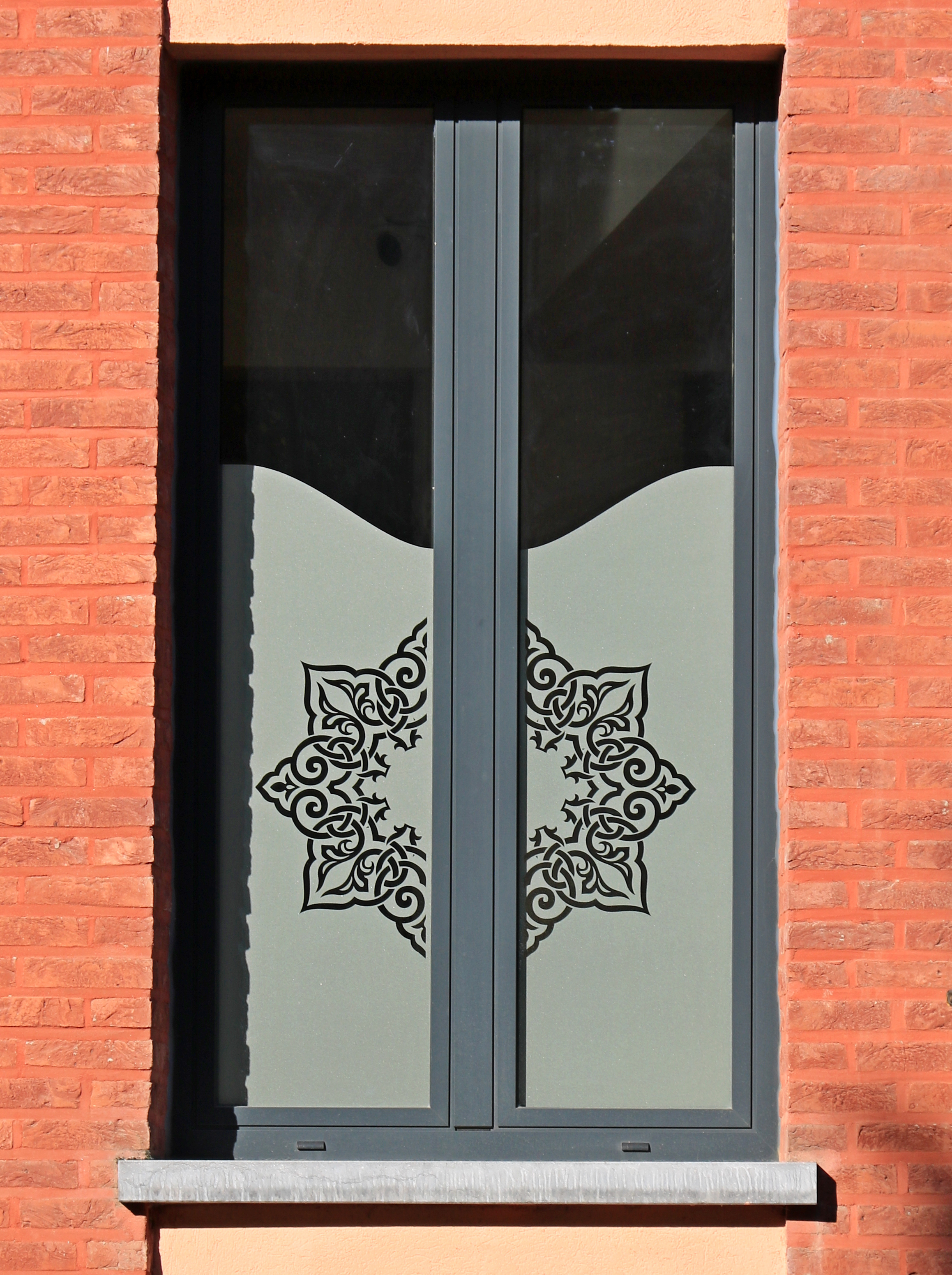 Belgique - Louvain-la-Neuve - Mosquée (architecte Miloud Bouzahzah, construction 2011-2016)